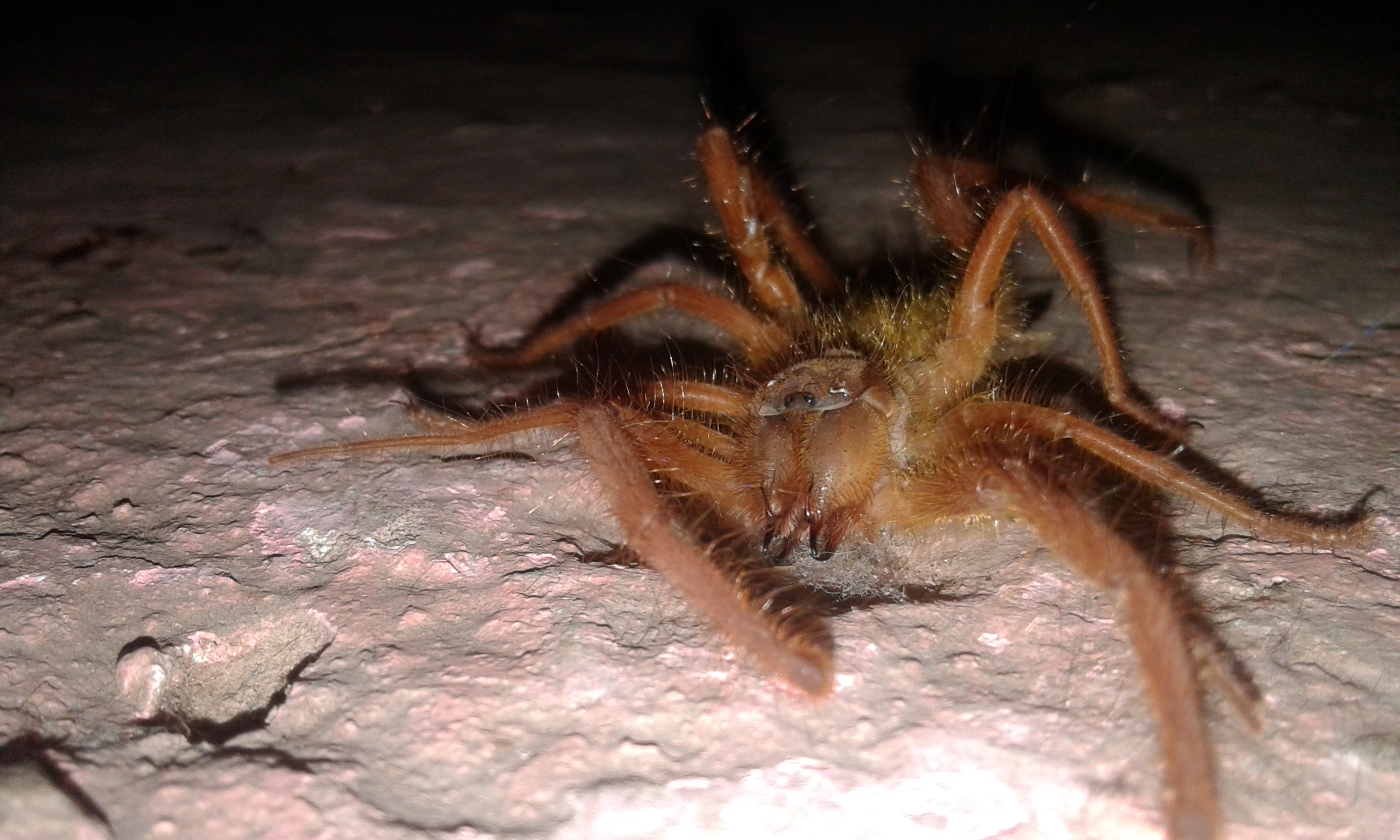 صورة لعقرب الرمال